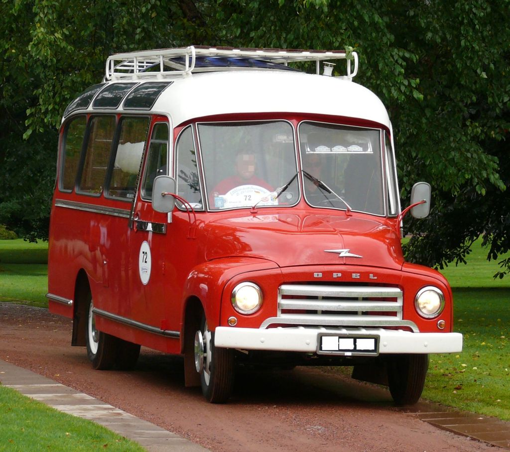 Opel Blitz Panoramabus